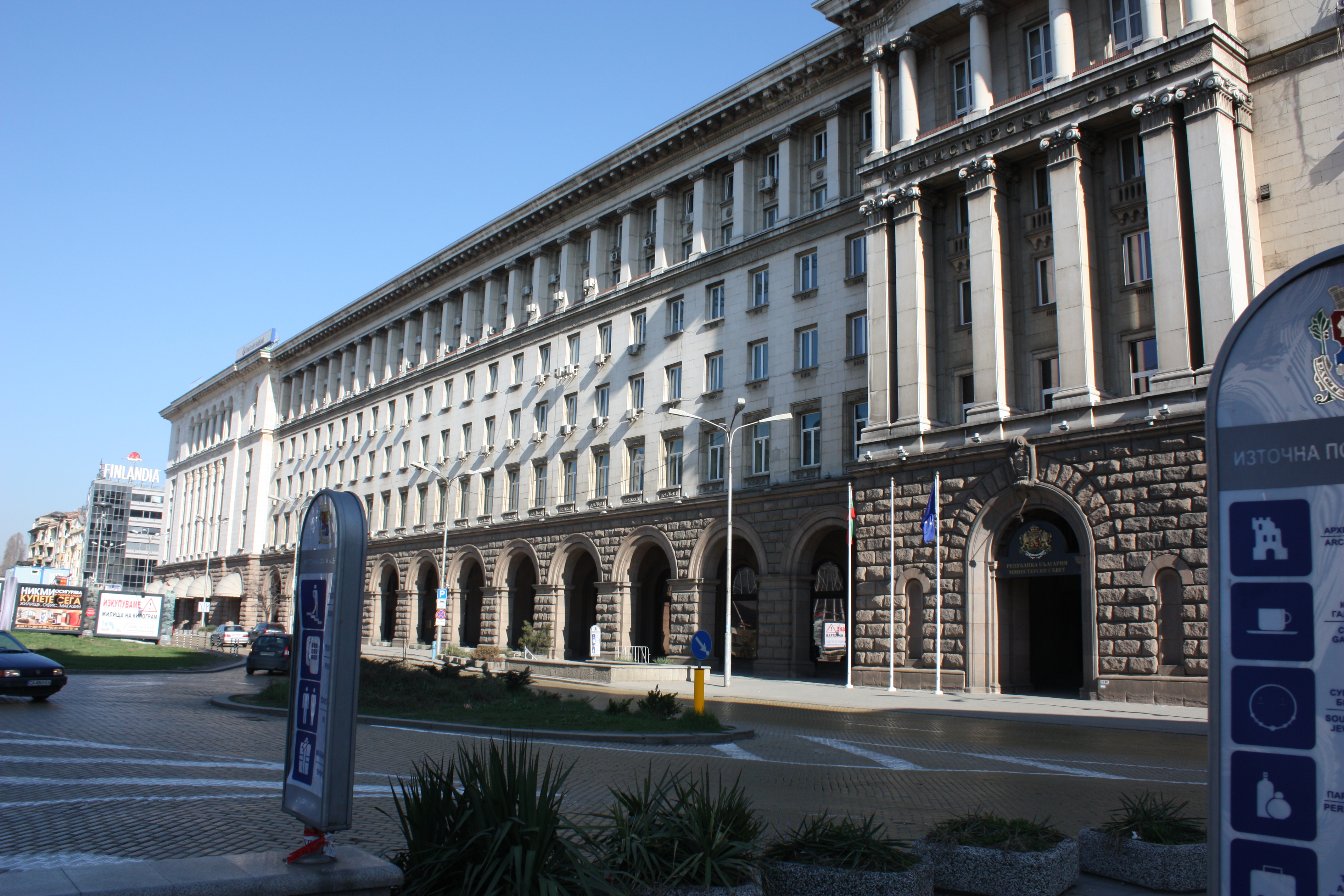 Ministerrat Gebäude Sofia, Sofia, Bulgaria, Presidents Administration Building, Präsidentensitz in Sofia, Hof des Ministerrates, Platz der Freiheit, Площад на свободата